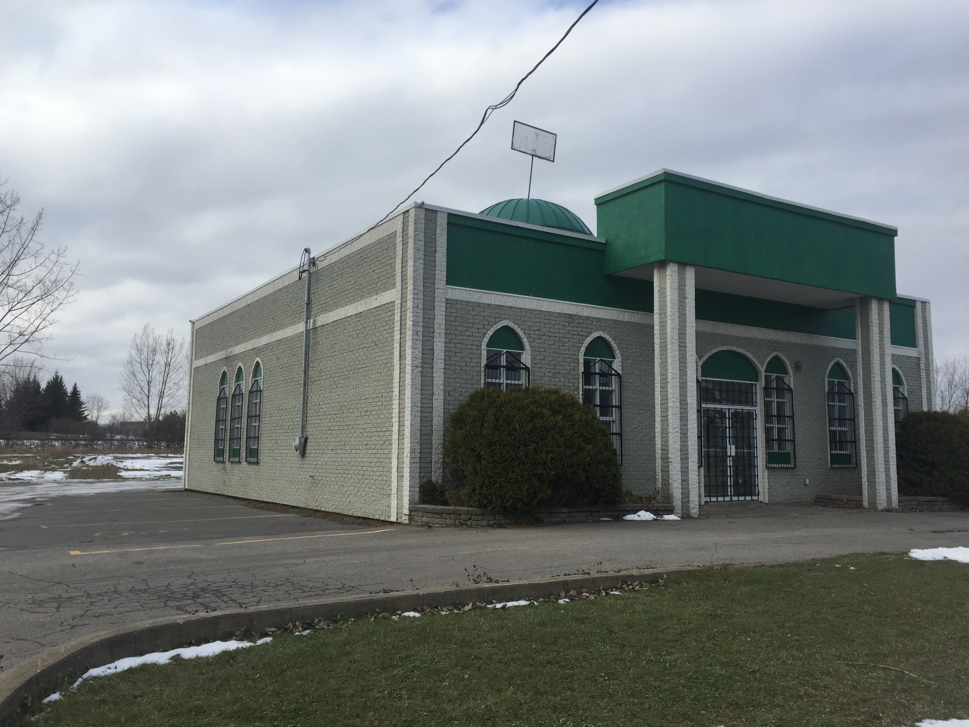 Installation appartenant au cimetière